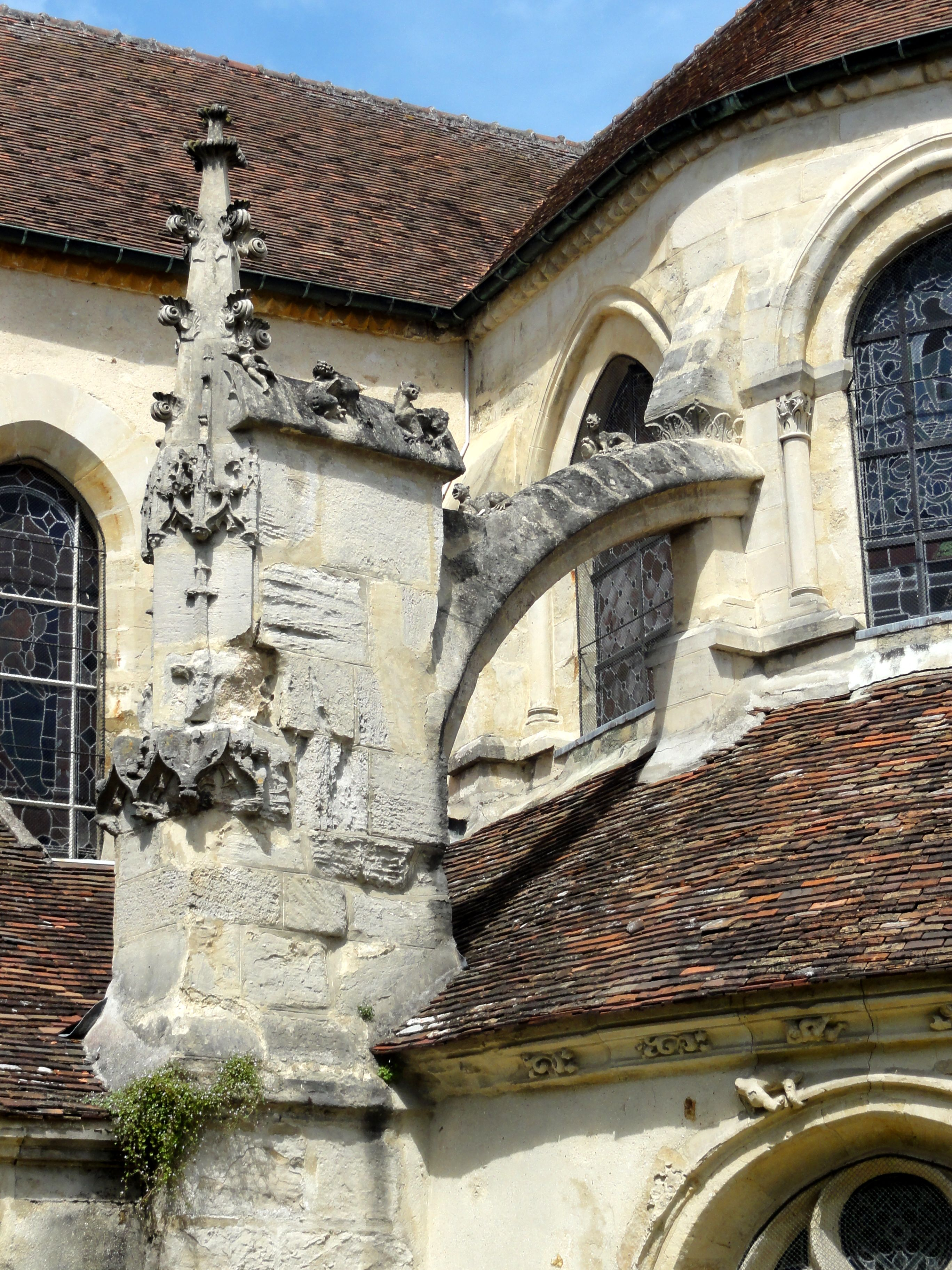 Arc-boutant des murs hauts de l'abside.